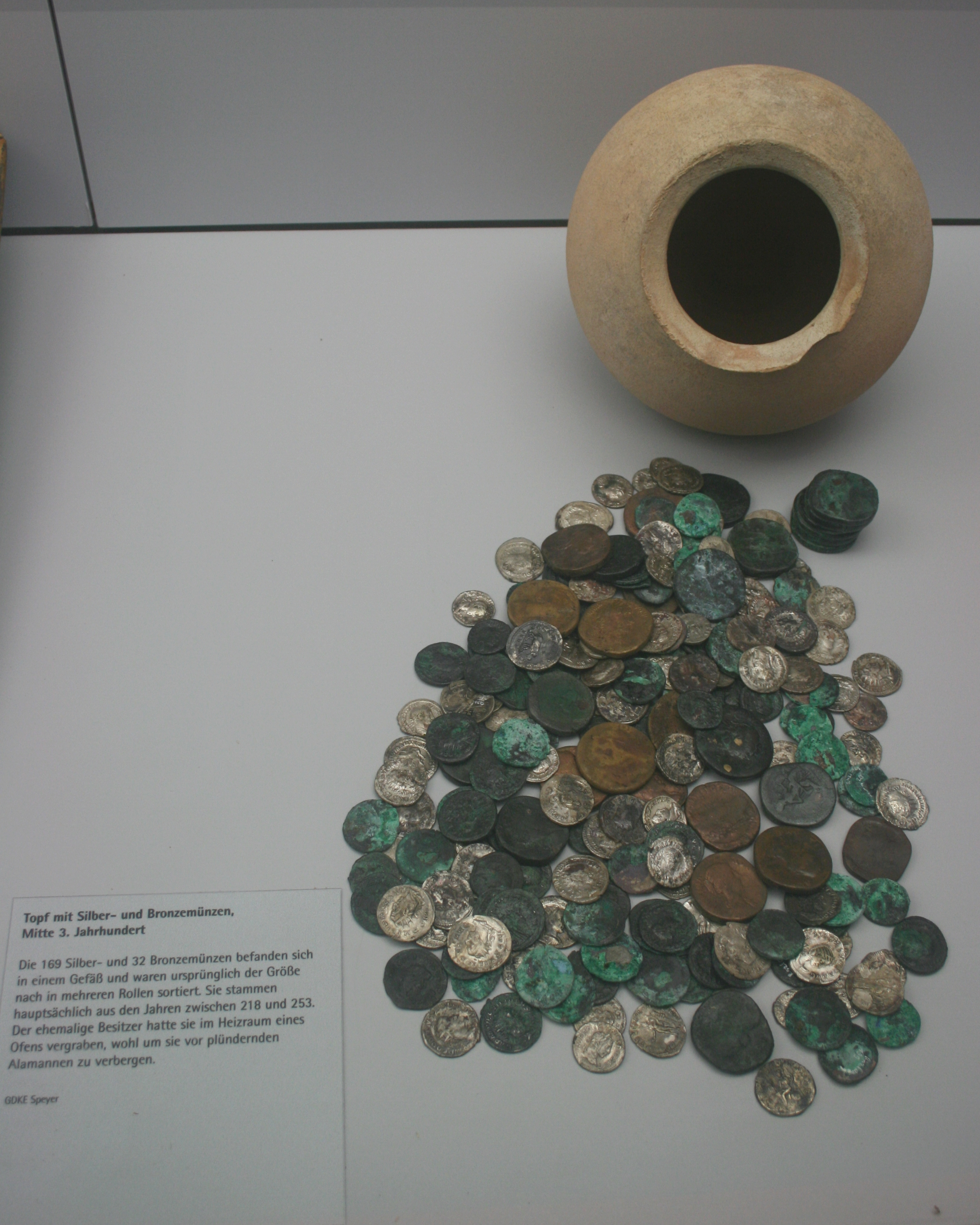 Münzschatz aus Rheinzabern, Mitte des 4. Jahrhunderts n. Chr.